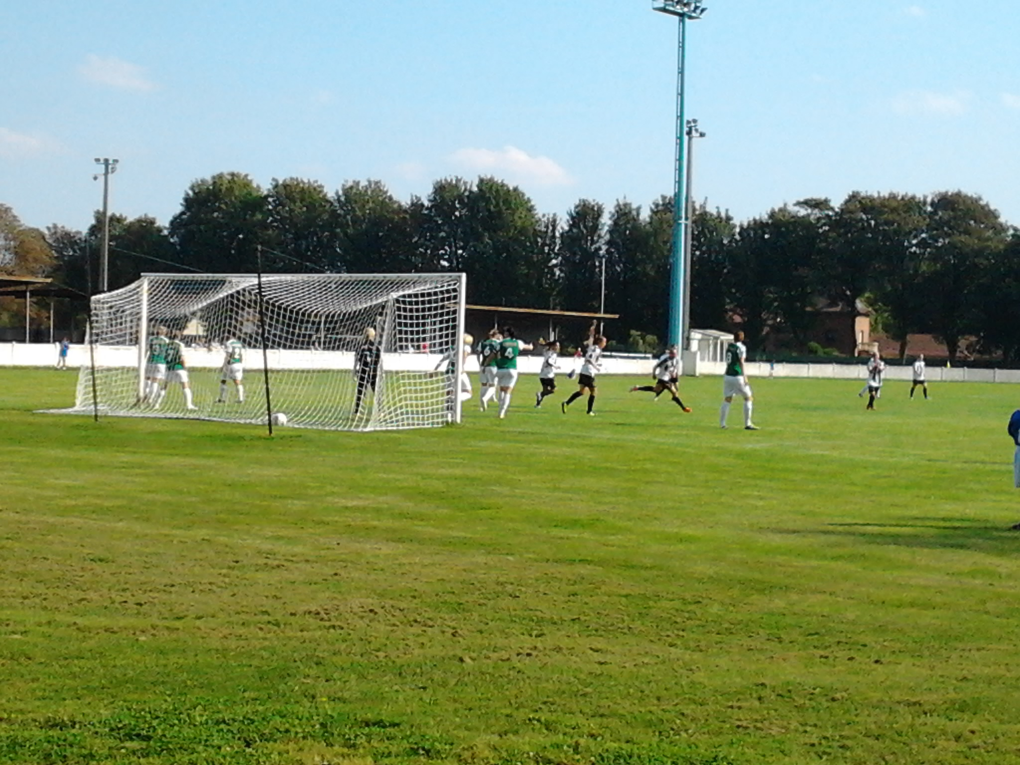 Troisième but du matc FCF Hénin-Beaumont/Juvisy (0-9), troisième journée du championnat de France de football féminin 2011-2012